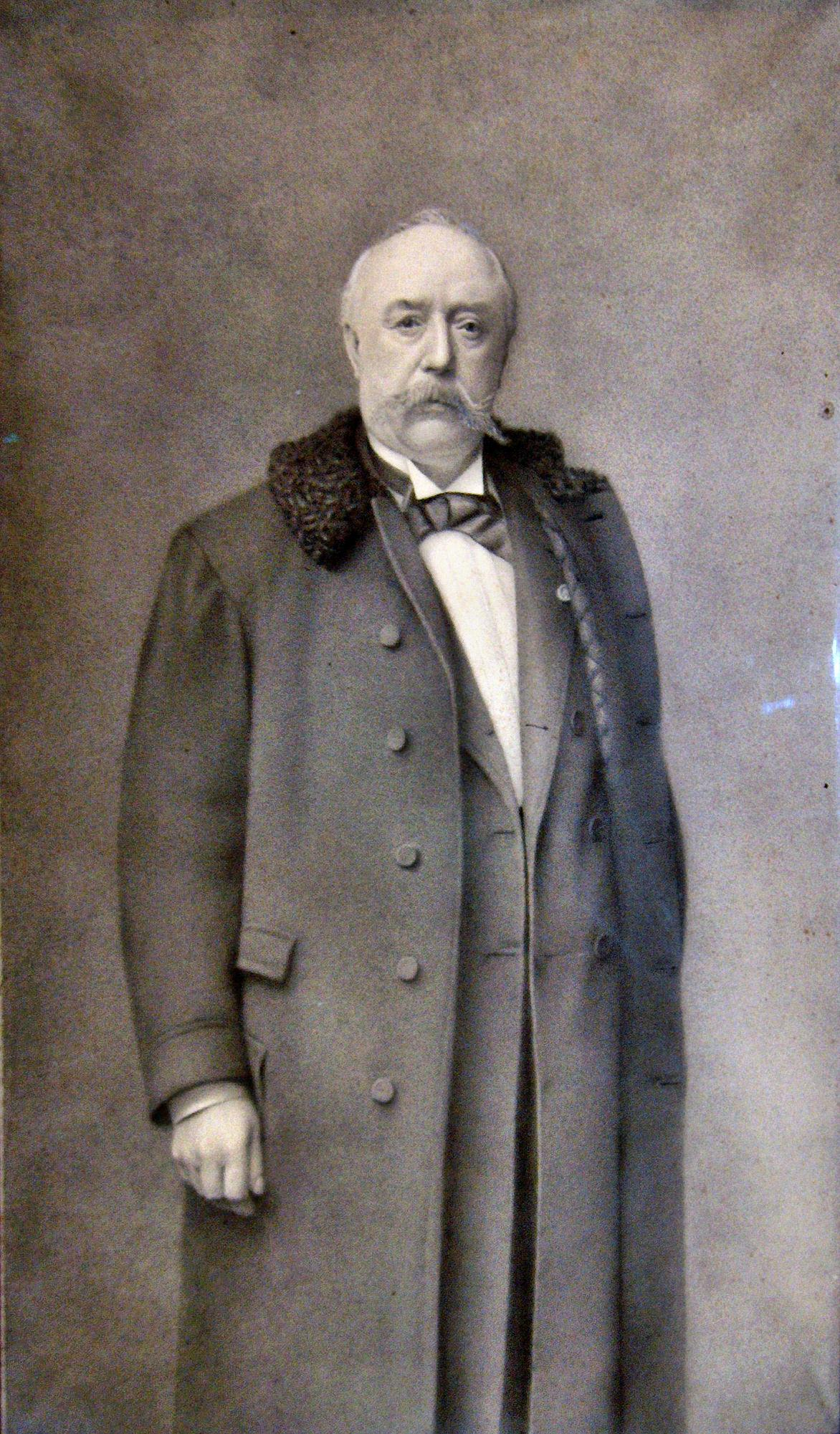 Portret (rond 1900) van de architect Louis Delacenserie (1838-1909)